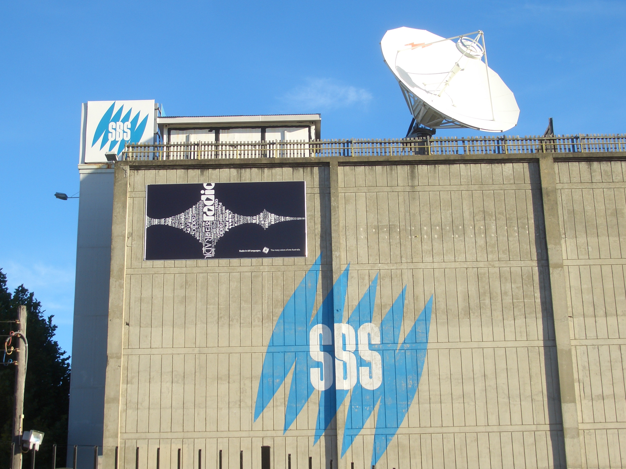 SBS Studio, Artarmon